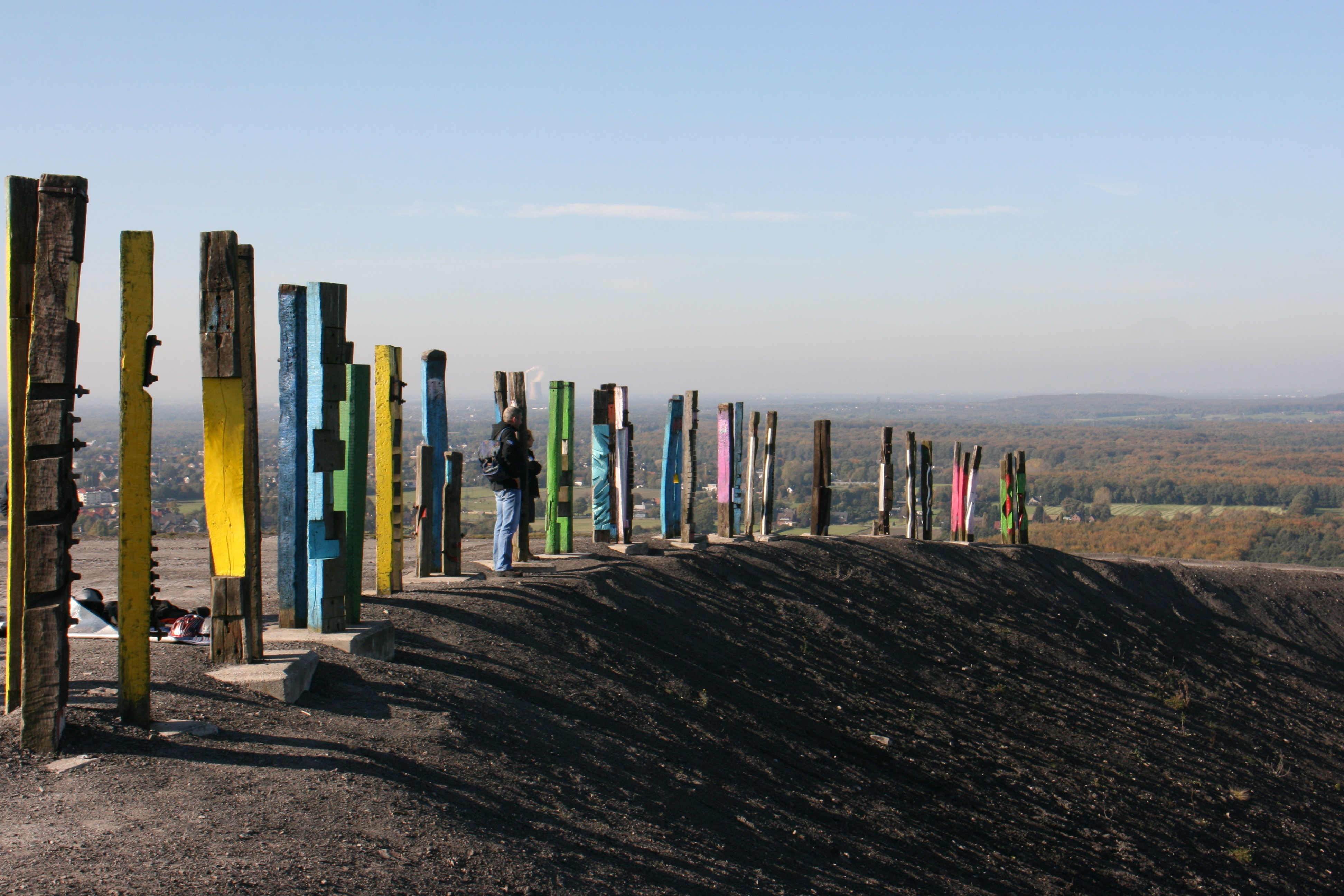 "Totems" von Agustín Ibarrola auf Halde Haniel in Bottrop